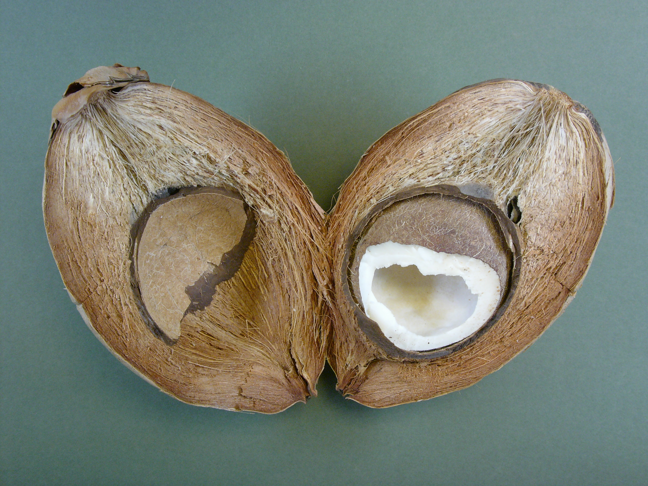 Coconut